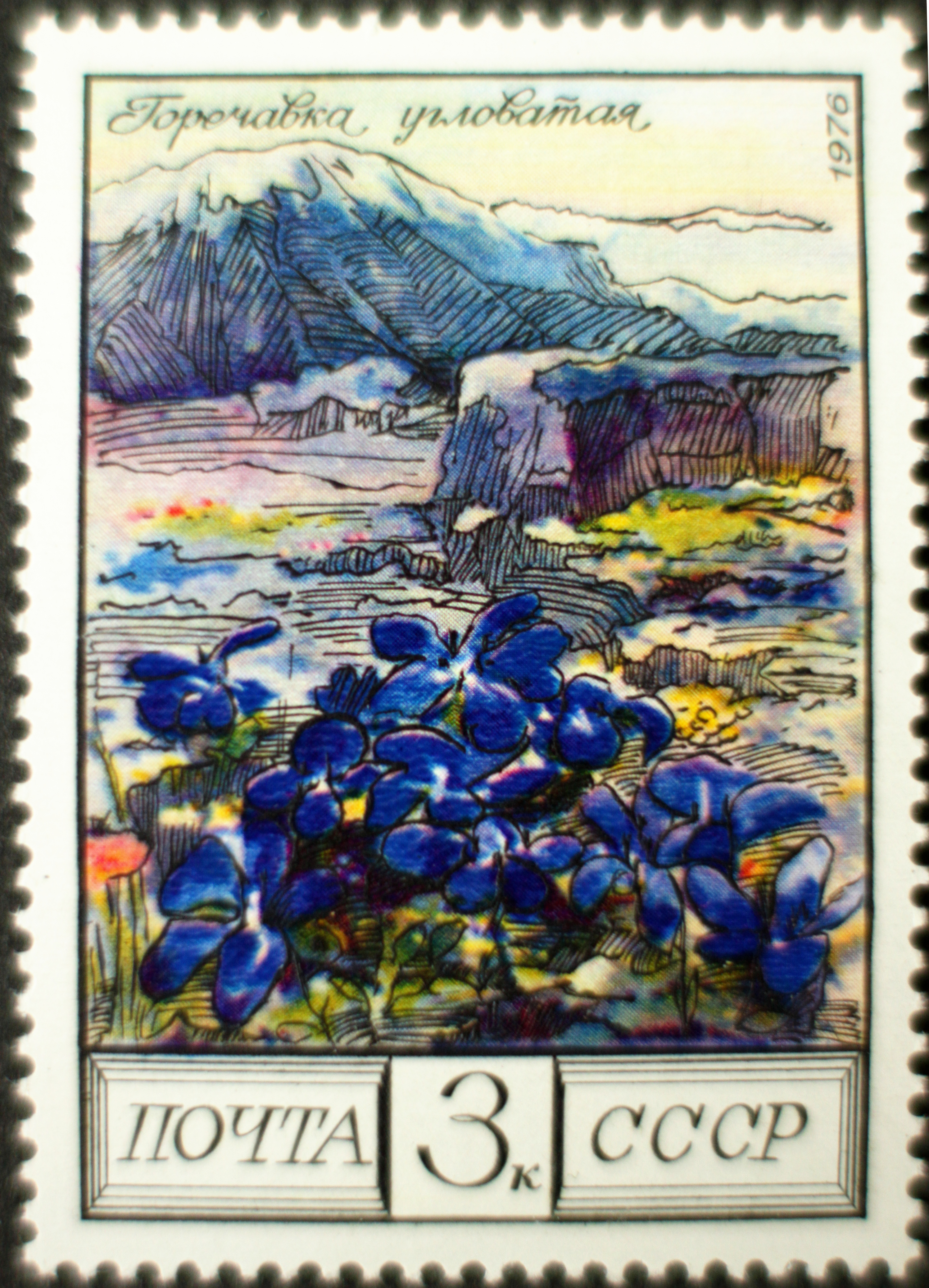 Gentiana verna subsp. pontica (Syn. Gentiana angulosa)